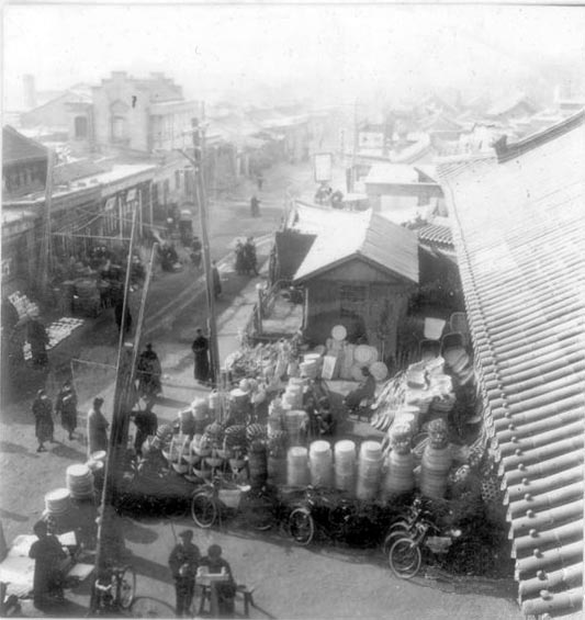 隆福寺山门前的摊贩